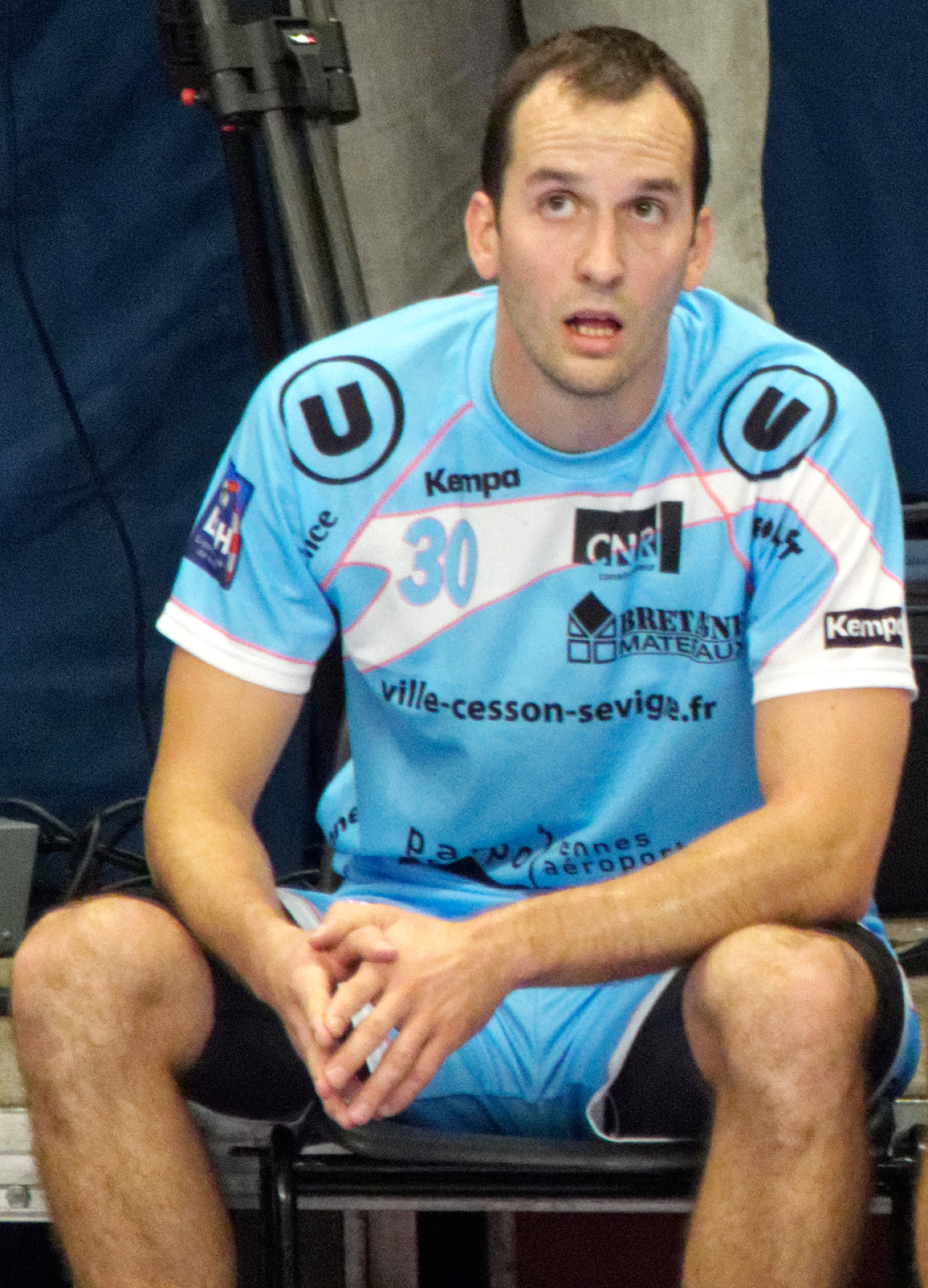 Match de championnat de LNH entre le PSG Handball et Cesson-Rennes. A Coubertin, le 24 septembre 2014.